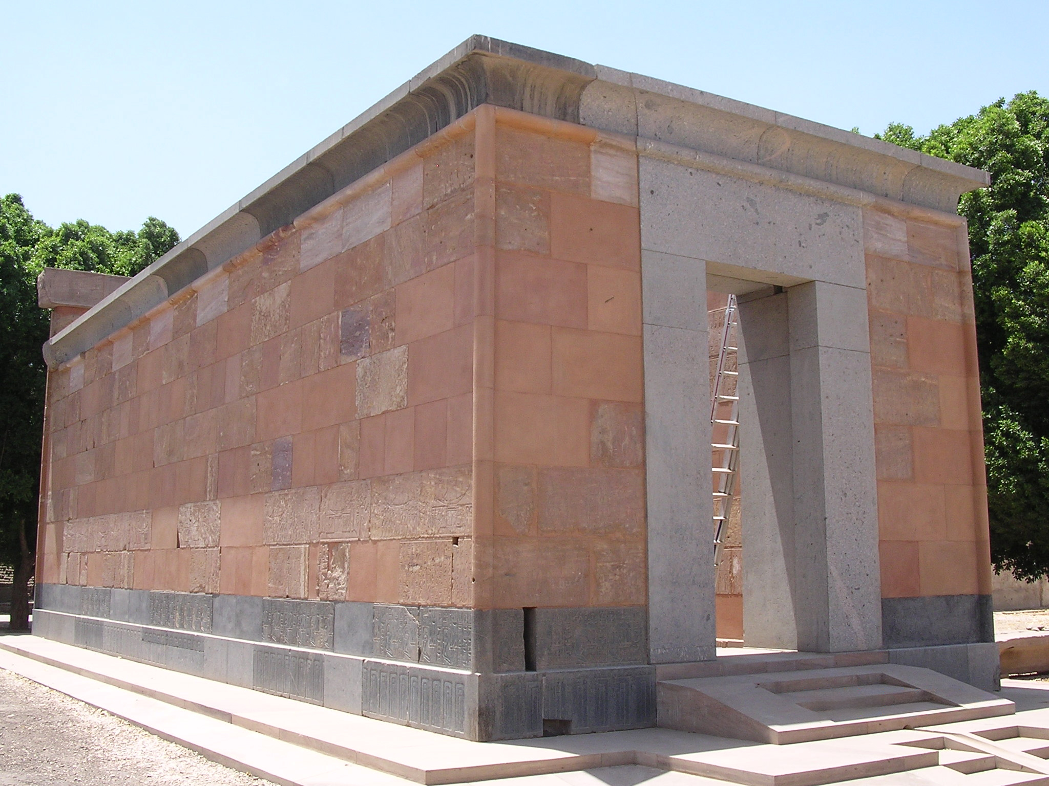 Hatsepszut vörös kápolnája (Karnak, Szabadtéri múzeum)